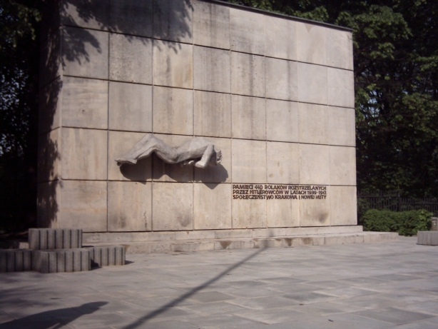 Pomnik upamiętniający poległych w Krzesławicach